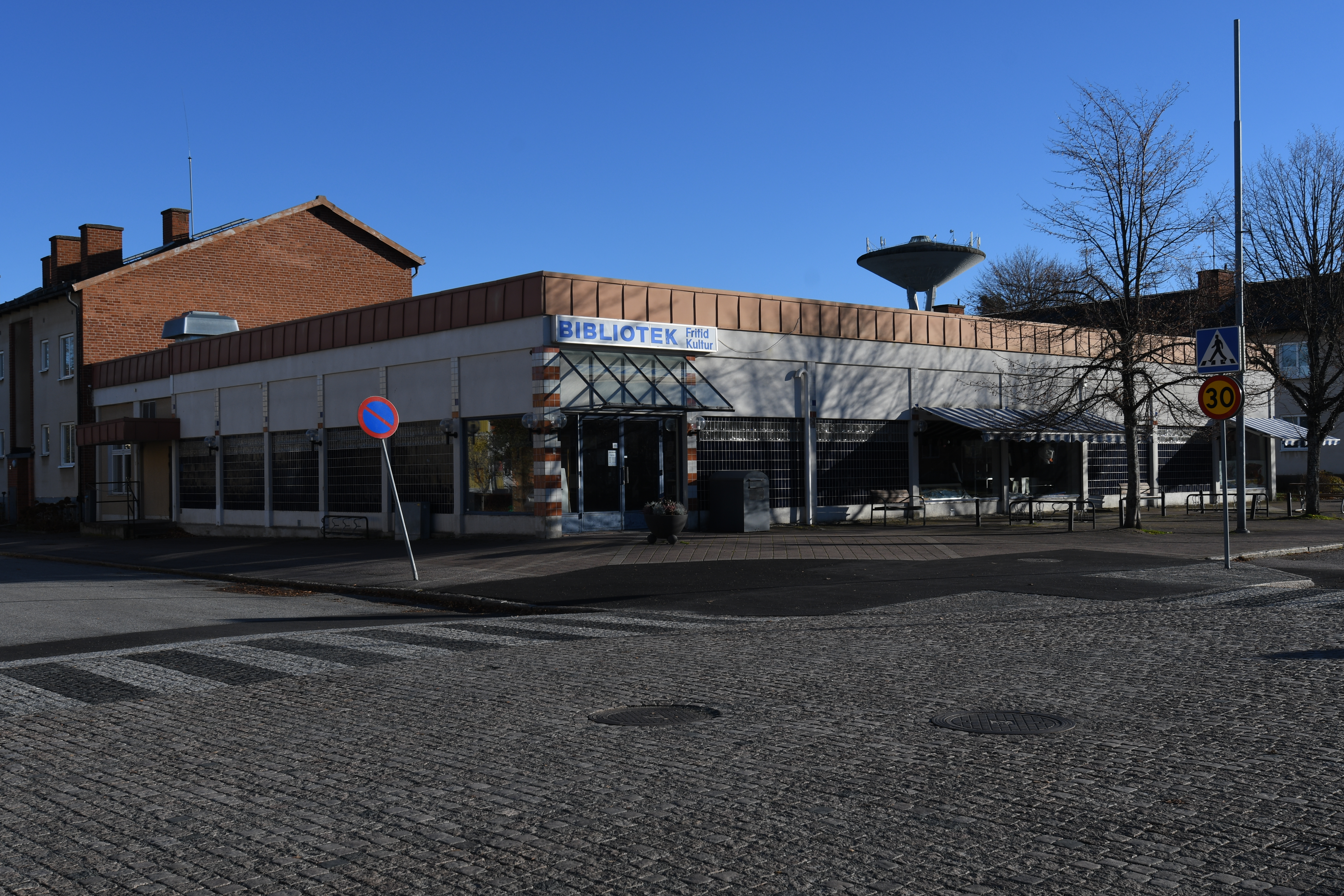 Laxå, november 2018. Biblioteket.